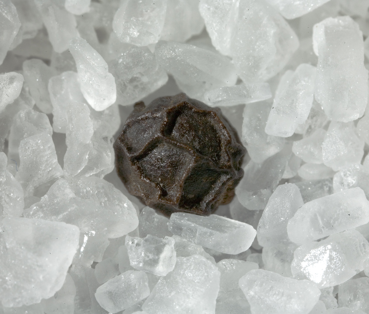 A piper nigrum peppercorn on sodium chloride (aka salt)